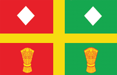 Прапор Радехівського району